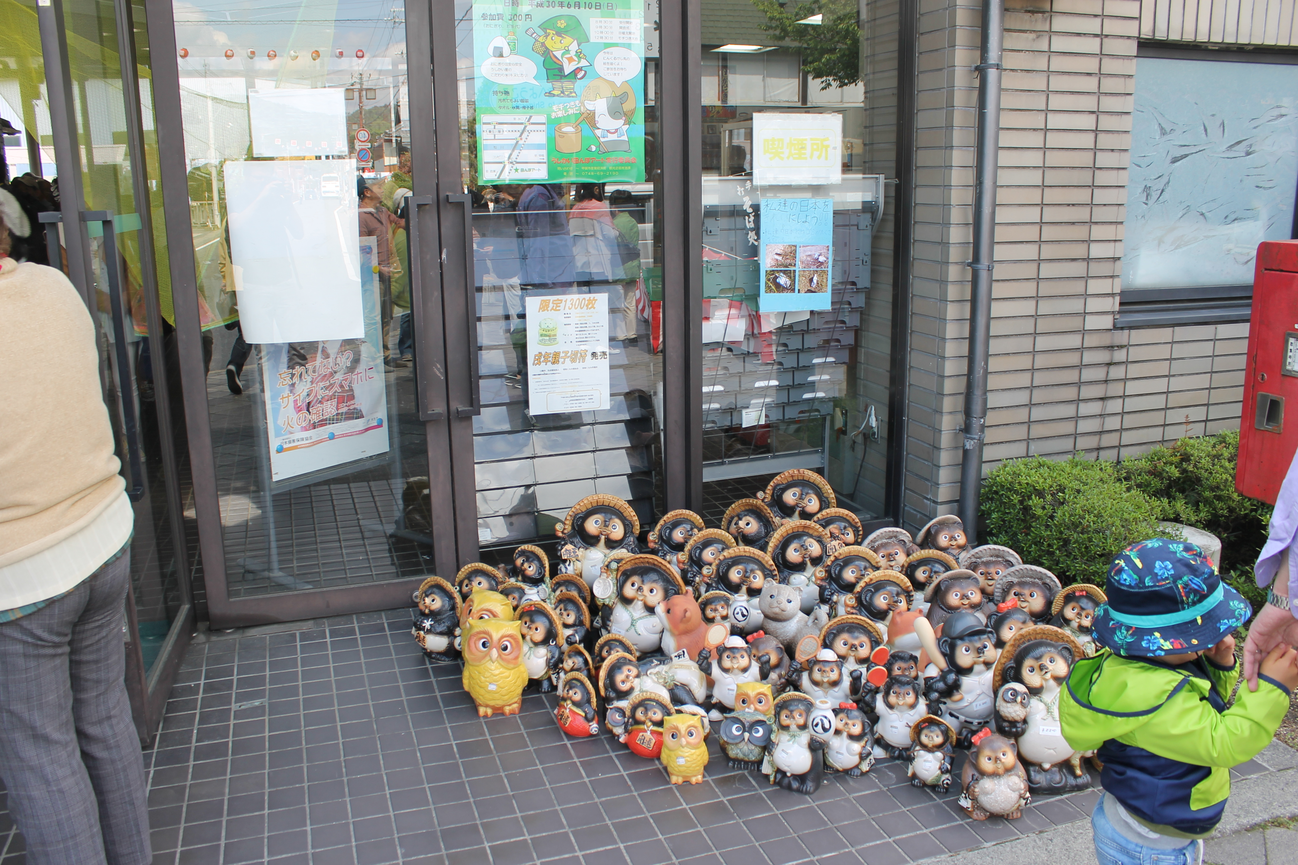 Des Shigaraki-yaki accueillent les visiteurs à la gare de Shigaraki. Les tanukis y sont omniprésents.